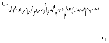 Figuur ter verduidelijking van het nut van een hoogfrequent-afvlak condensator.